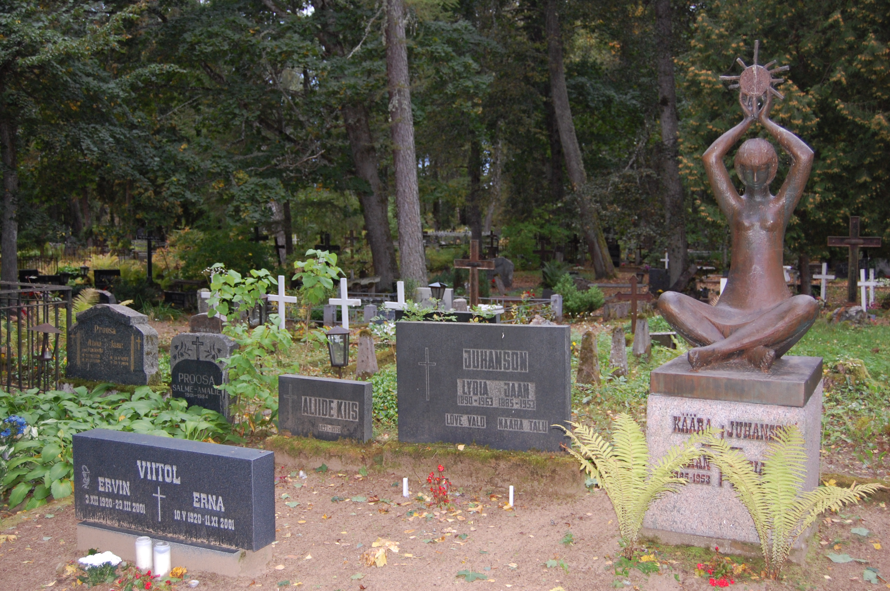 autor Erna Viitol asukoht Helme kalmistu